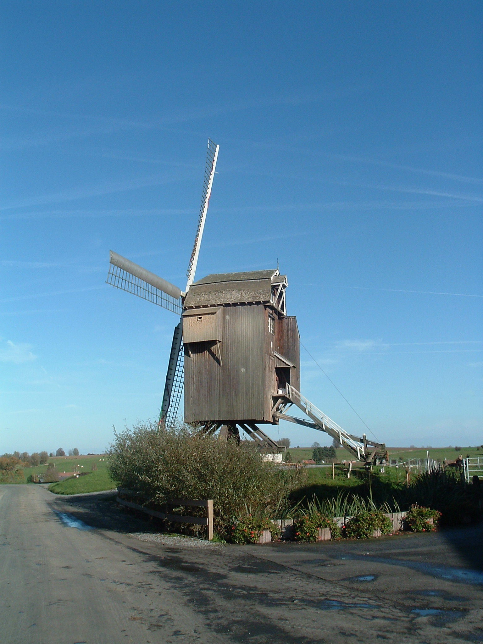 Le moulin de Moulbaix